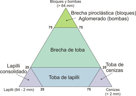 Gráfico de los diferentes tipos de piedras piroclasticas